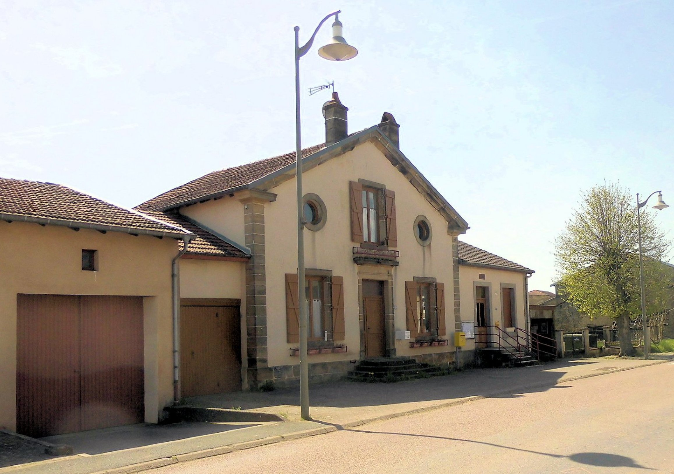 La mairie de Biécourt